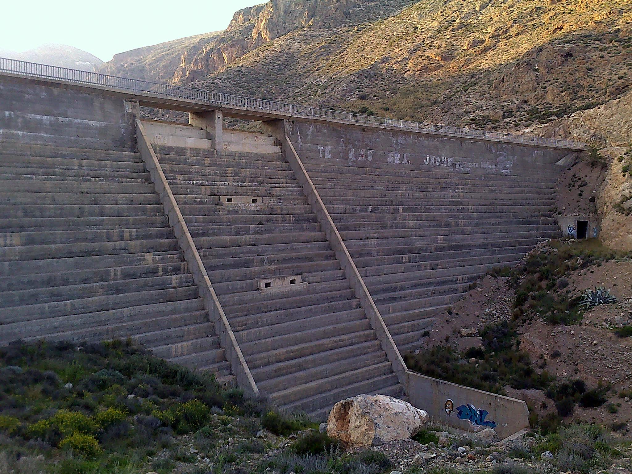 Presa de contención en las ramblas de Almería